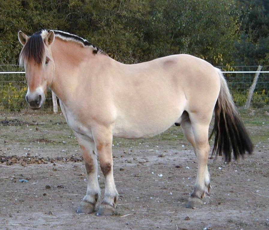 Cheval fjord Photo personnelle